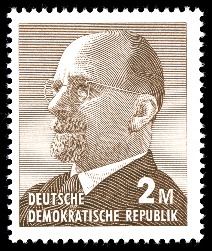 Stamp description / Briefmarkenbeschreibung Ausgabepreis: 200 Pfennig First Day of Issue / Erstausgabetag: 4. Juni 1969 Auflage: Briefmarken-Jahrgang 1969 der Deutschen Post der DDR Entwurf: Wolf Druckverfahren: Stichtiefdruck Michel-Katalog-Nr: Ländercode-MiNr: 1482